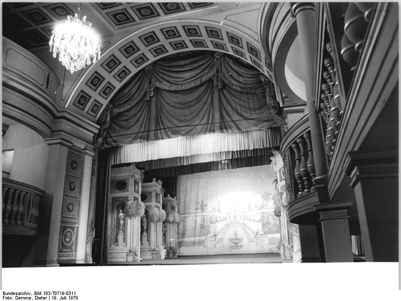 Gotha, Schloss Friedenstein, Ekhof-Theater ADN-ZB Demme 19.7.1978 Bez. Erfurt Das Ekhof-Theater im Schloß Friedenstein in Gotha.